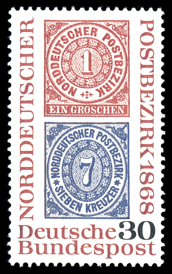 German stamp